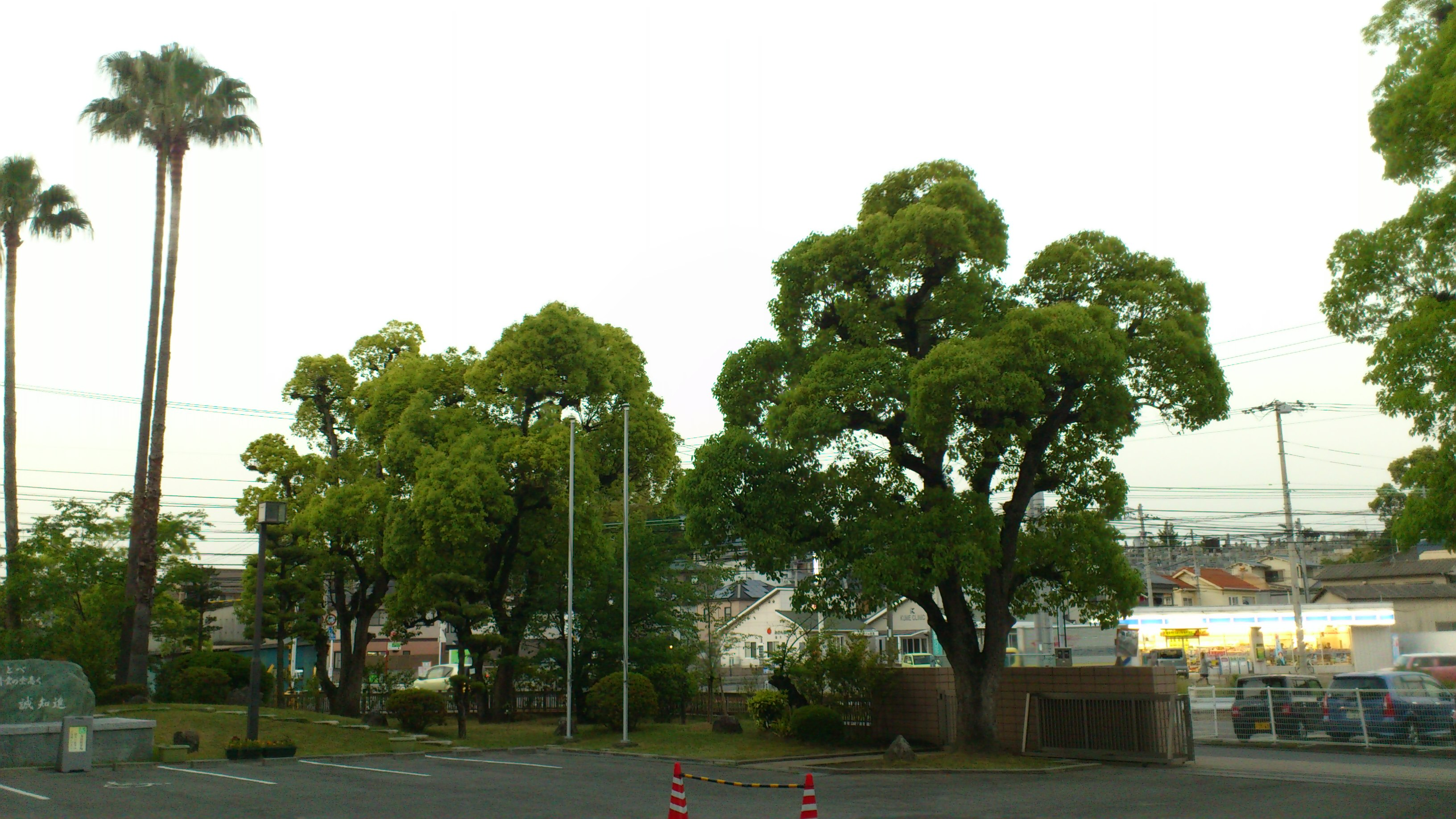 正門付近。